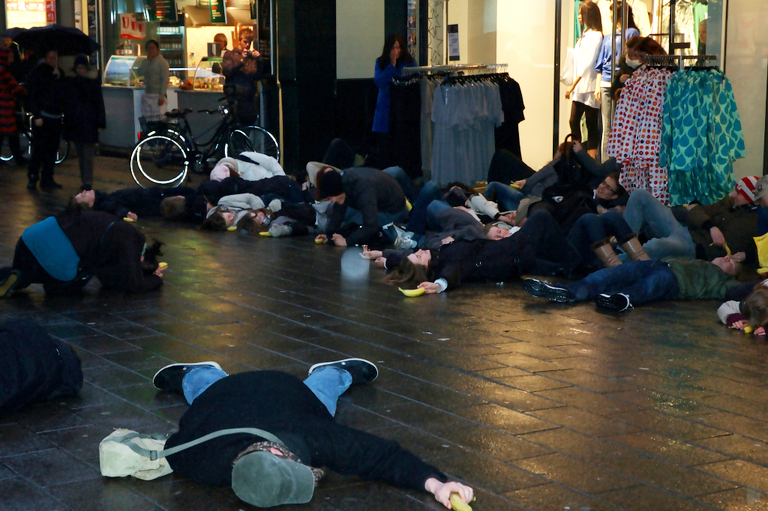 Flash mob "Bang" på Strøget, København